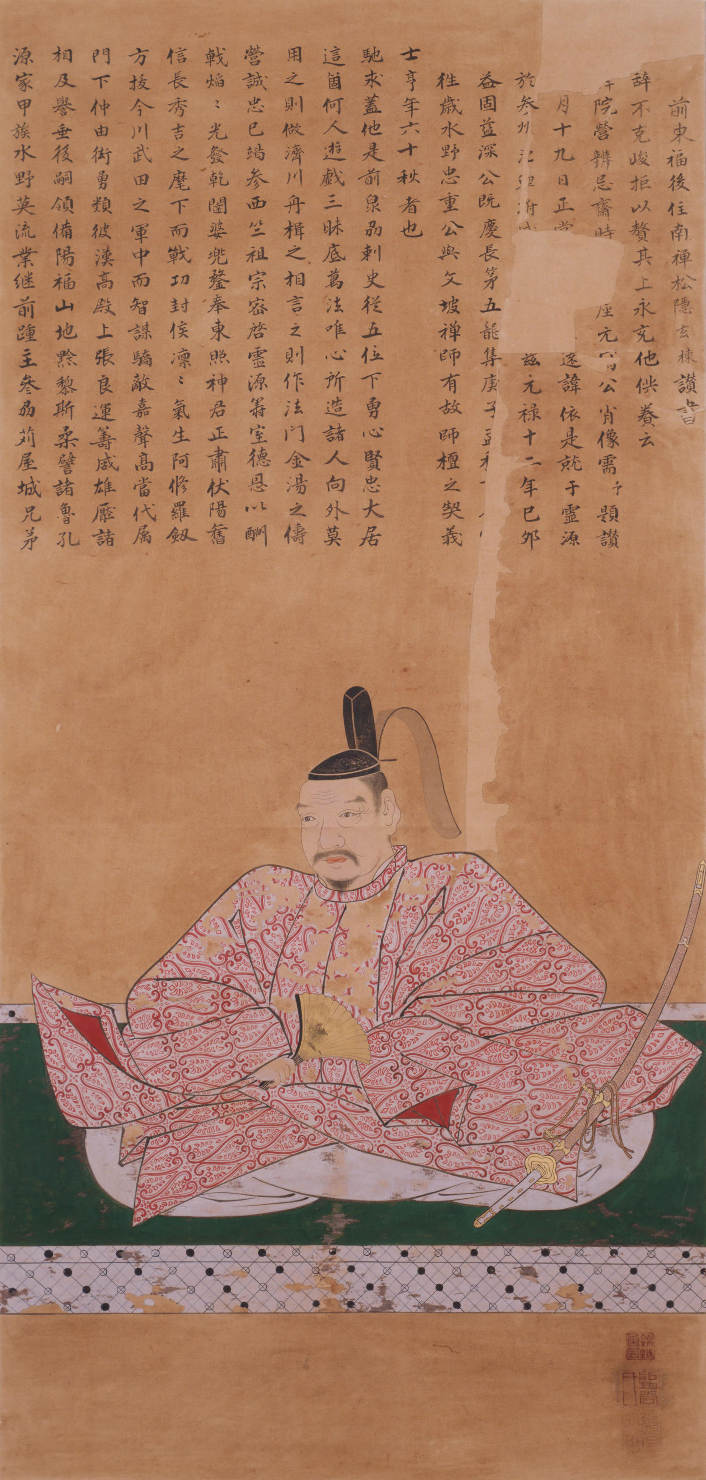 水野忠重の肖像。